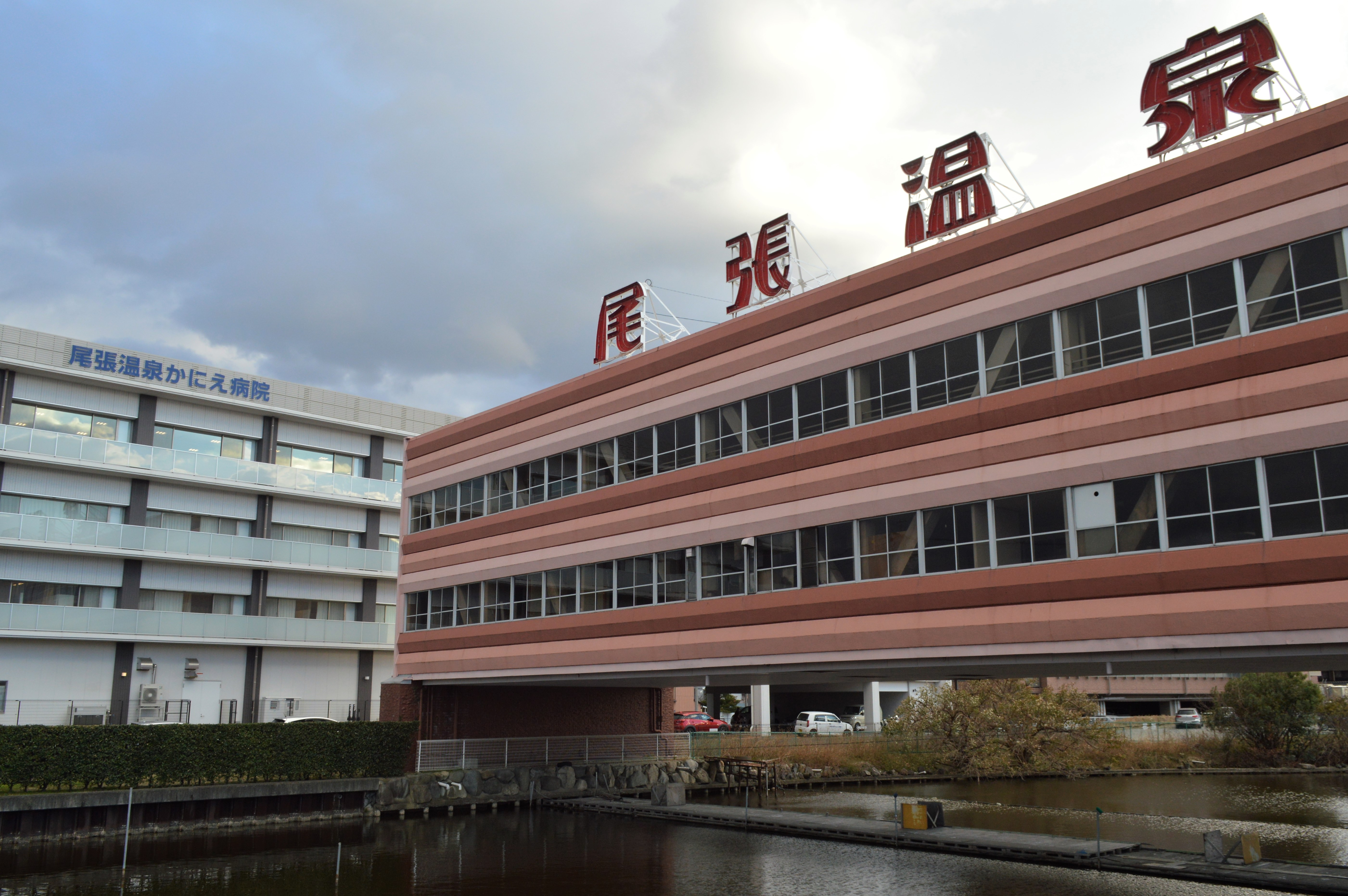 愛知県海部郡蟹江町にある尾張温泉（右）と尾張温泉かにえ病院（左）。